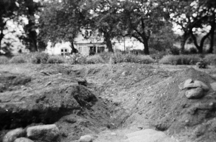 Kyrkplatsen. Under utgrävning. Kategori: (01) Exteriörer, detaljerKyrkplatsen. Under utgrävning.